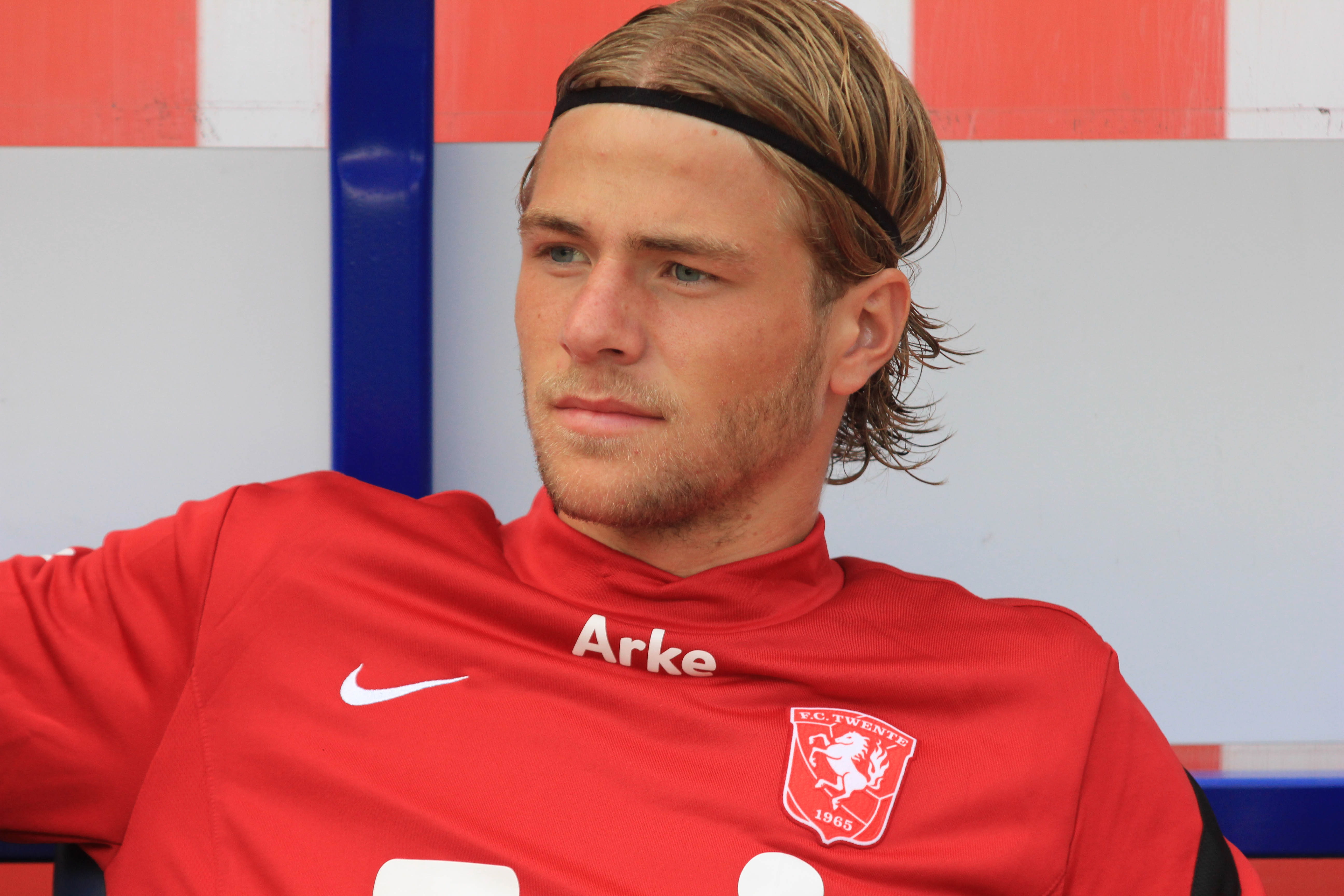 Dutch footballer Robbert Schilder, FC Twente